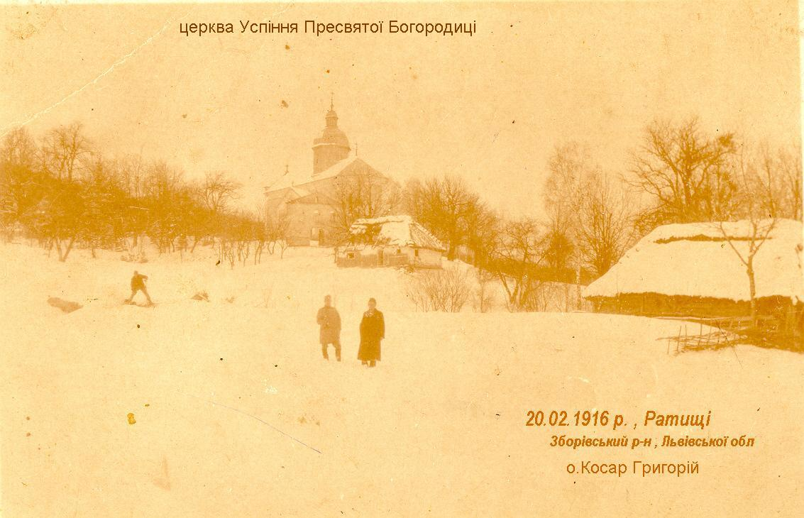 Церква Успіння Пресвятої Богородиці. село Ратищі, Зборівський район, Тернопільська область. 20.02.1916 р.